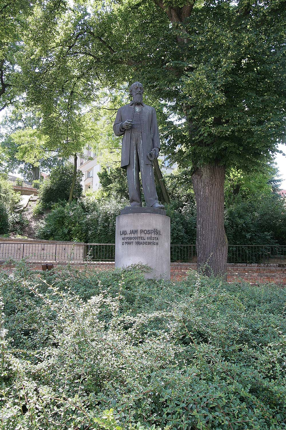 Hradec Králové, socha Ladislava Jana Pospíšila od Josefa Škody, v západní části Žižkových sadů.